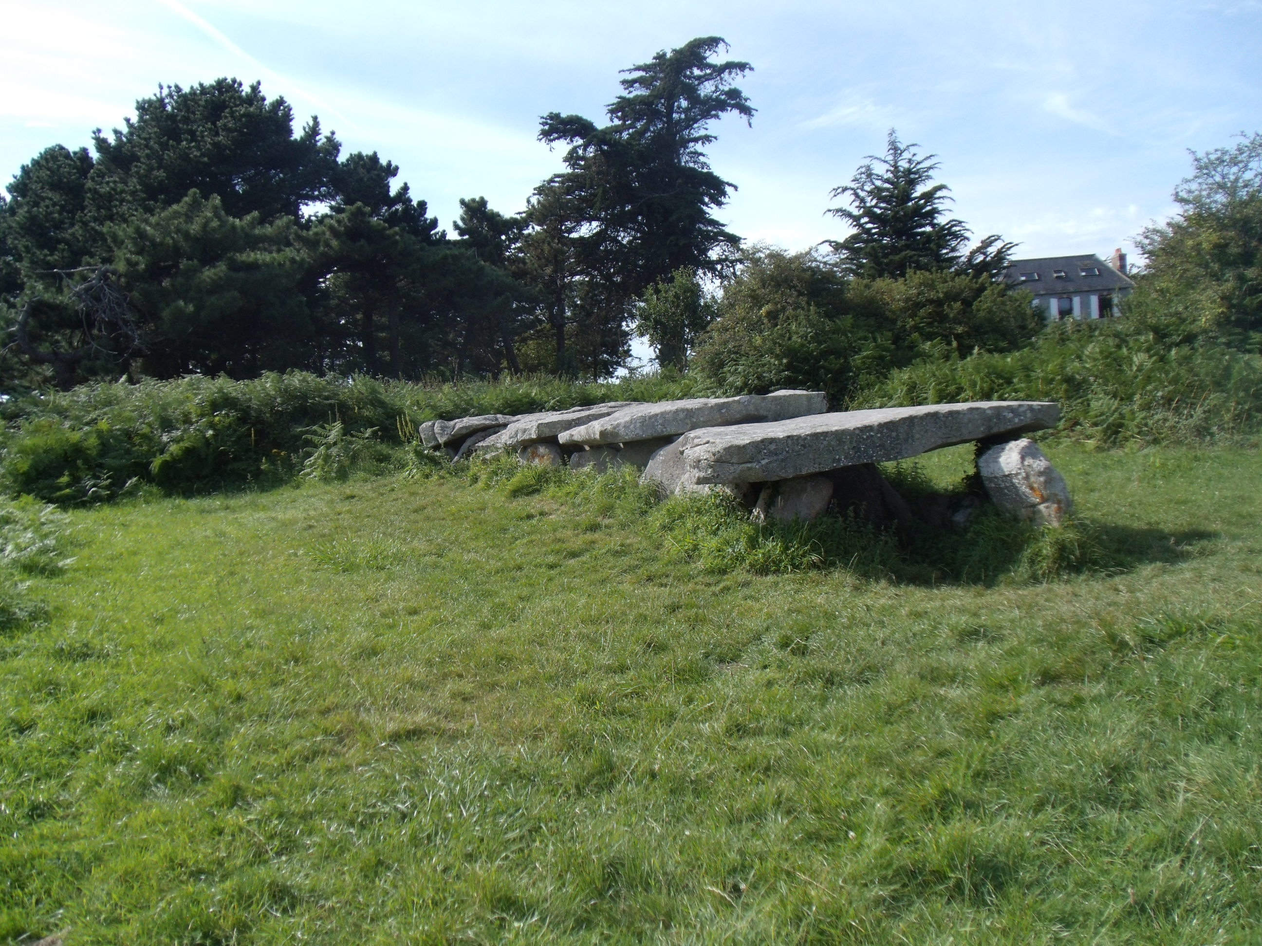 L'allée couverte de Prajou-Menhir